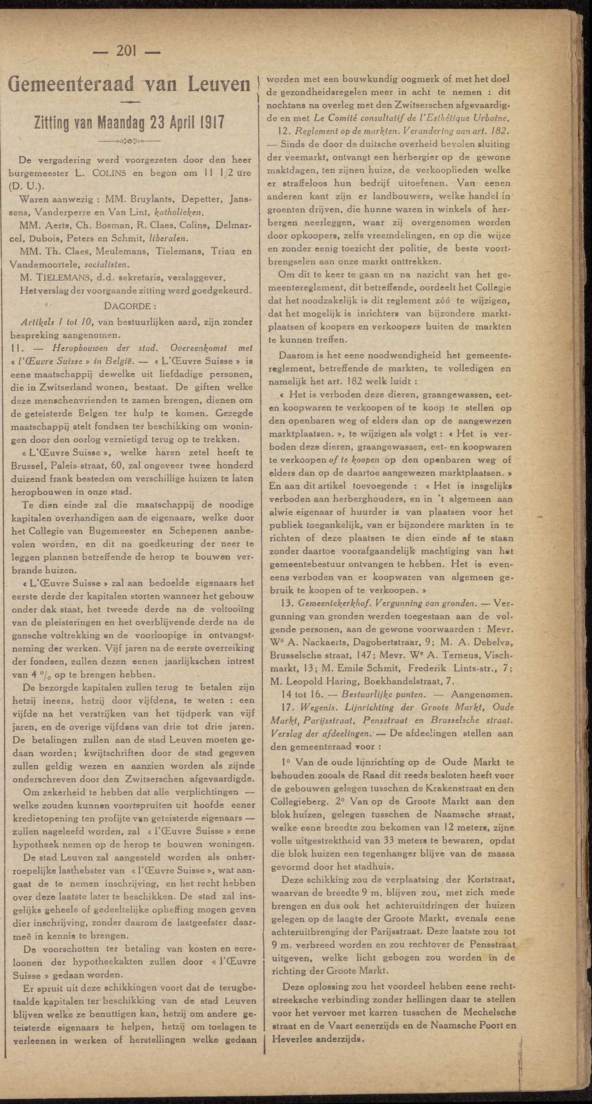 Oeuvre Suisse en Belgique in de Leuvense gemeenteraad van april 1917